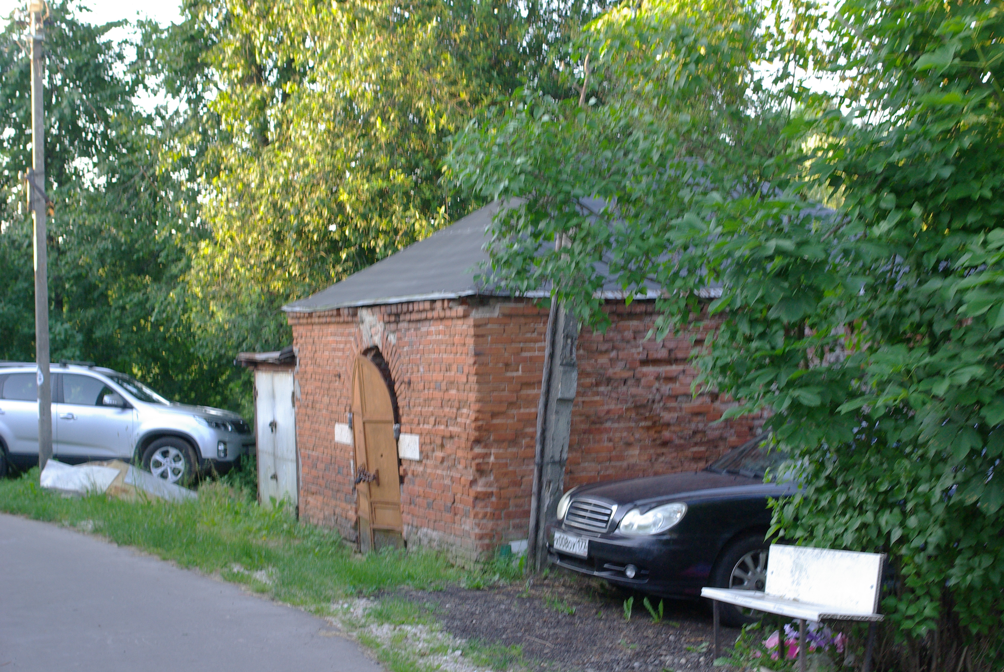 деревня